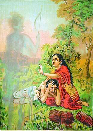 Savitri